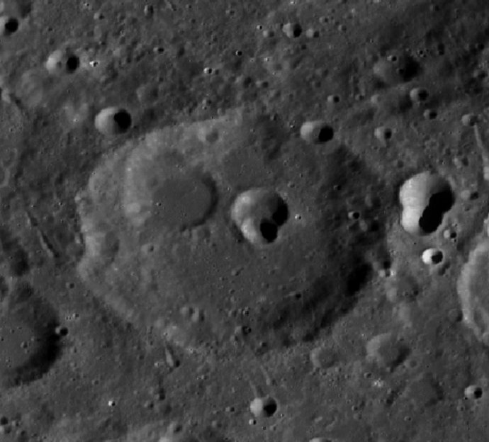 Cráter lunar Frost. (Imagen LRO)